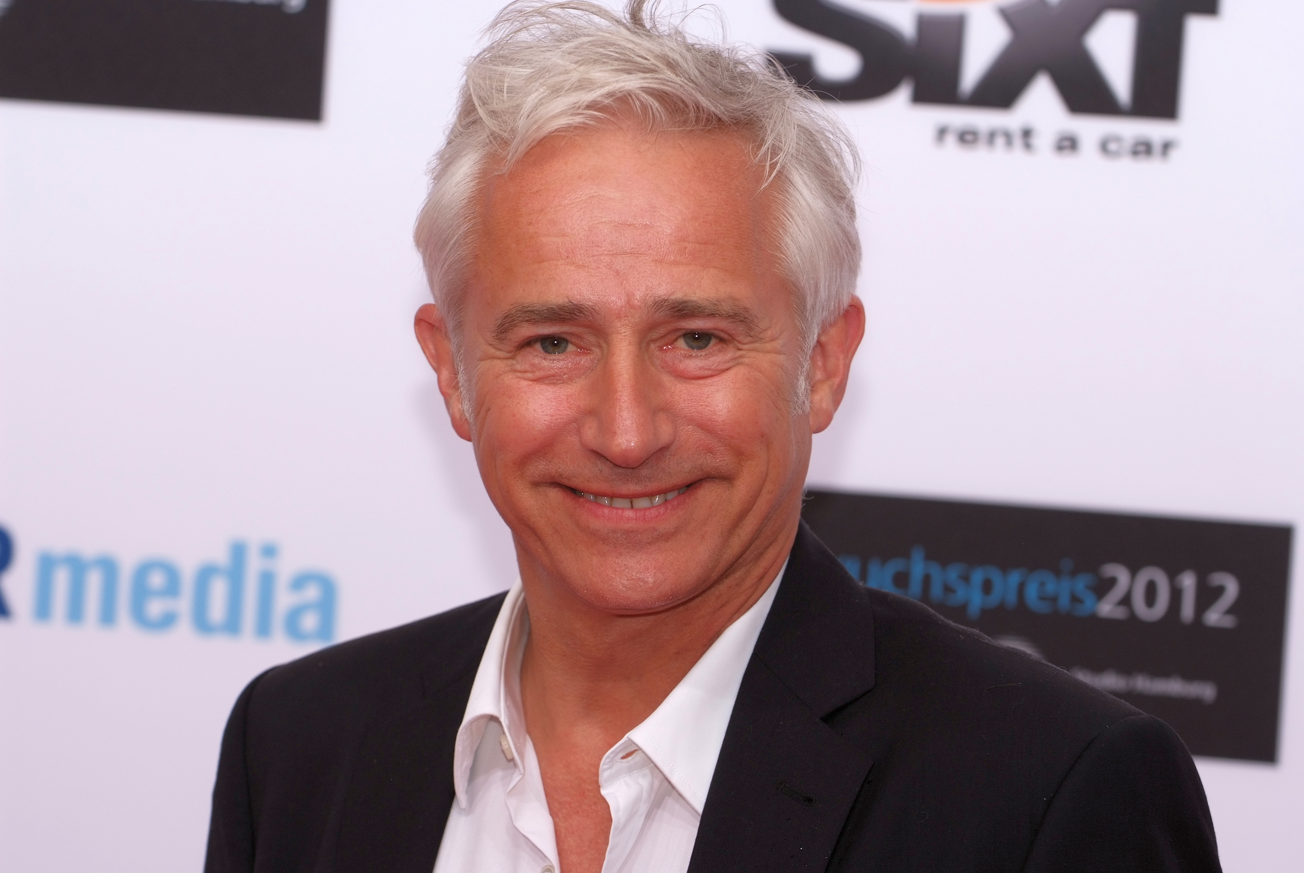 Gerry Hungbauer beim Studio Hamburg Nachwuchspreis 2012